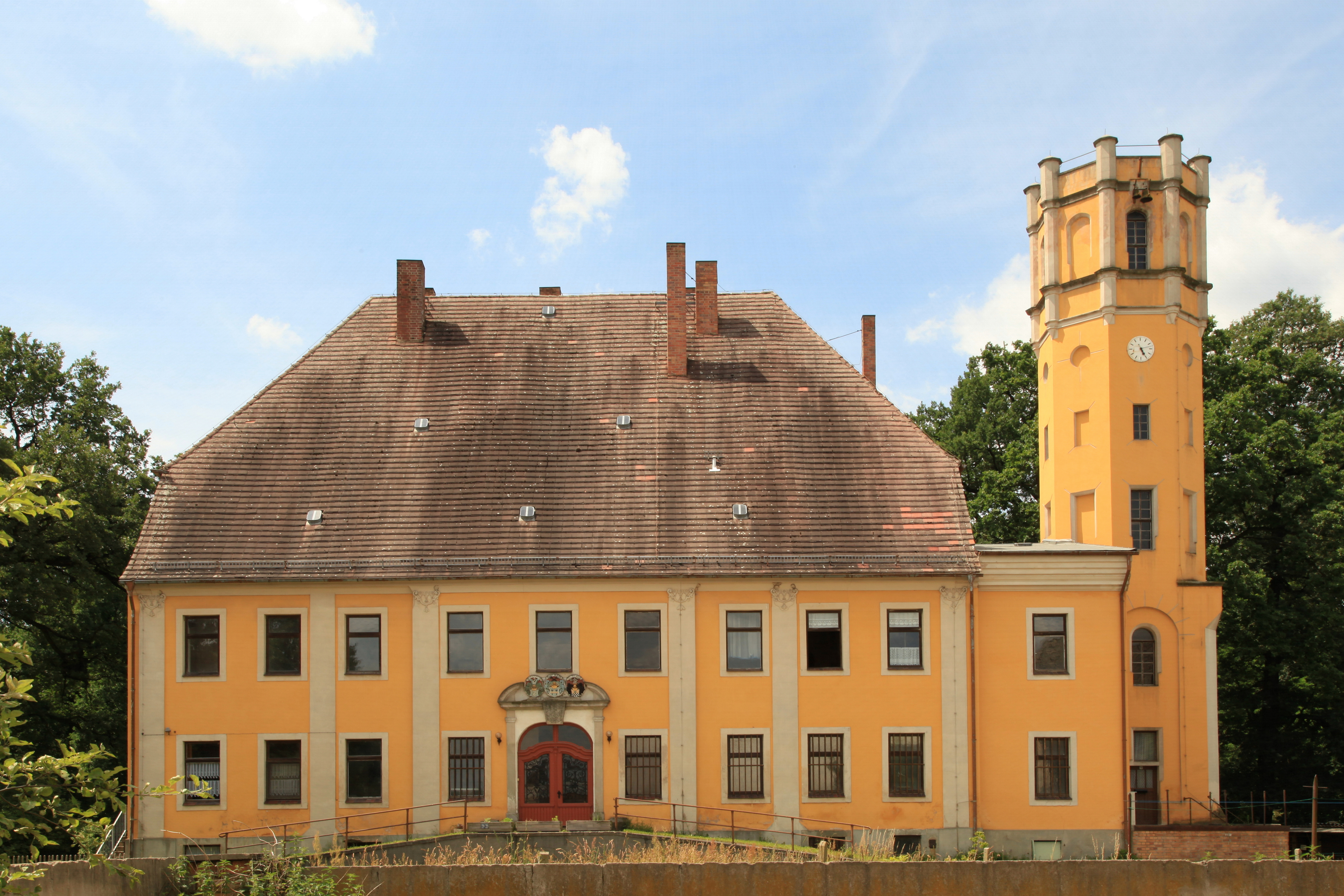 Schloss Spree an der Rothenburger Straße in Spree, Hähnichen